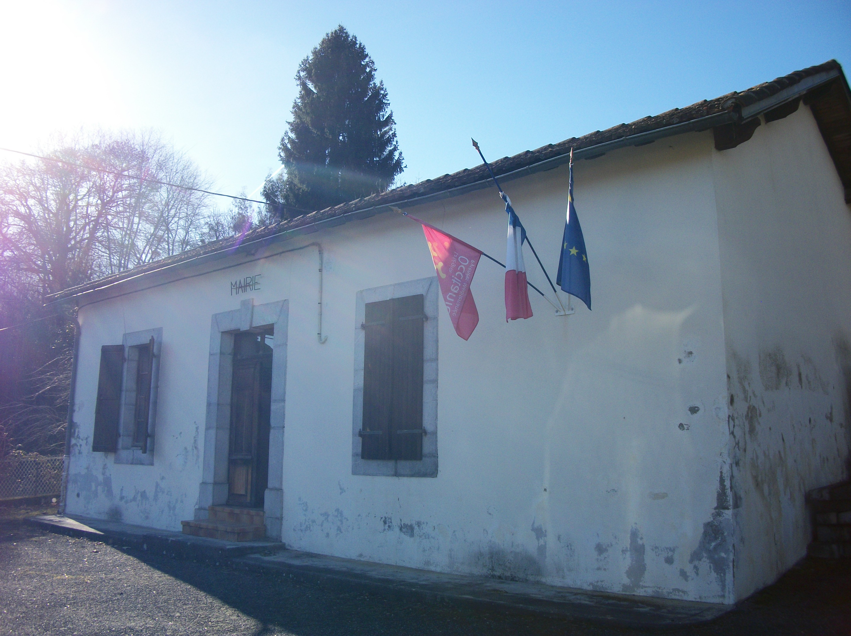 La mairie